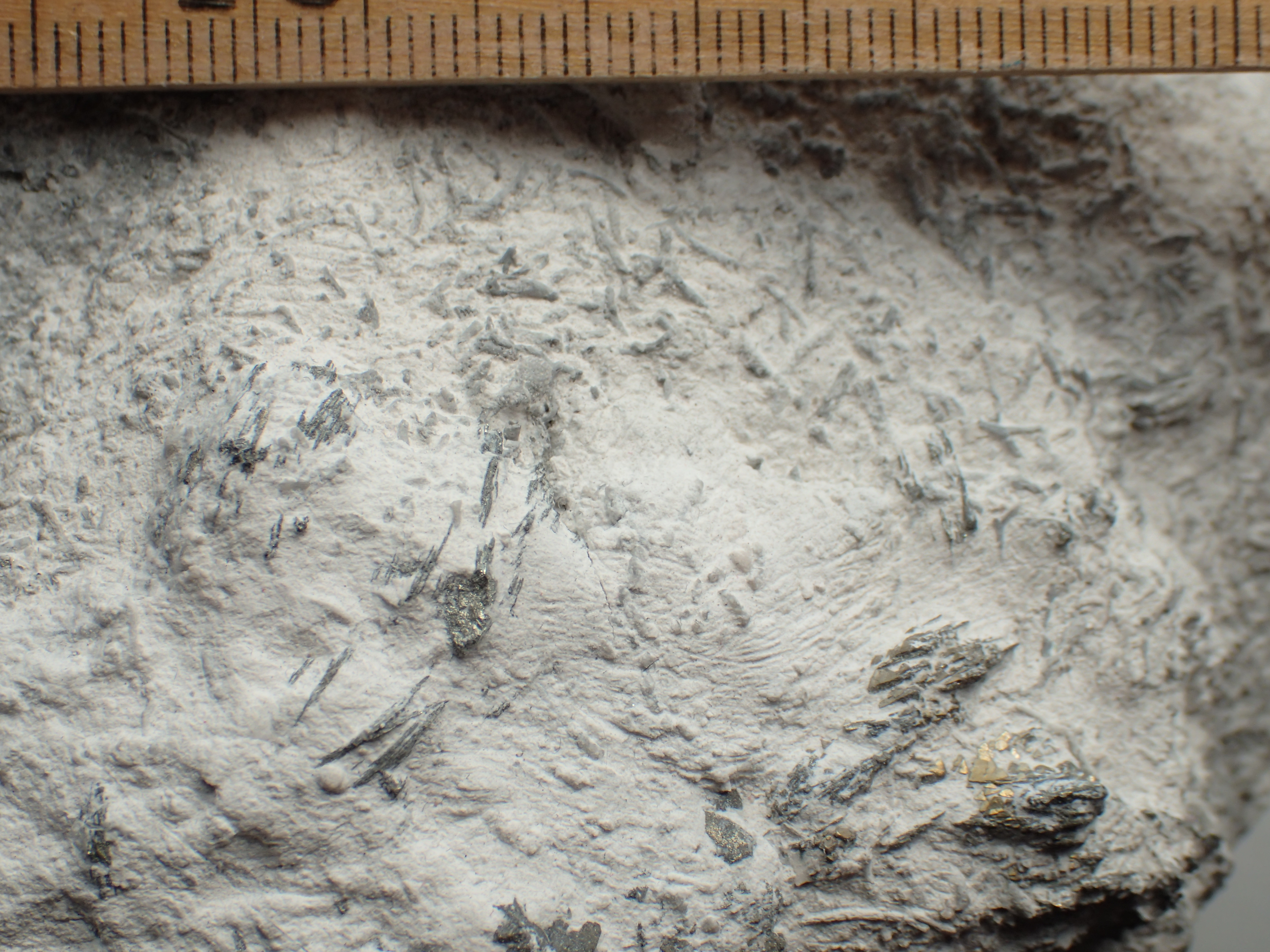 Kalksandskalk fra København kalk Fm med pyritudfældninger (blåsort, dog nederst th gyldent)